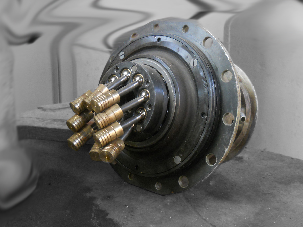 Поршни аксиально-поршневой гидромашины привода металлорежущего станка